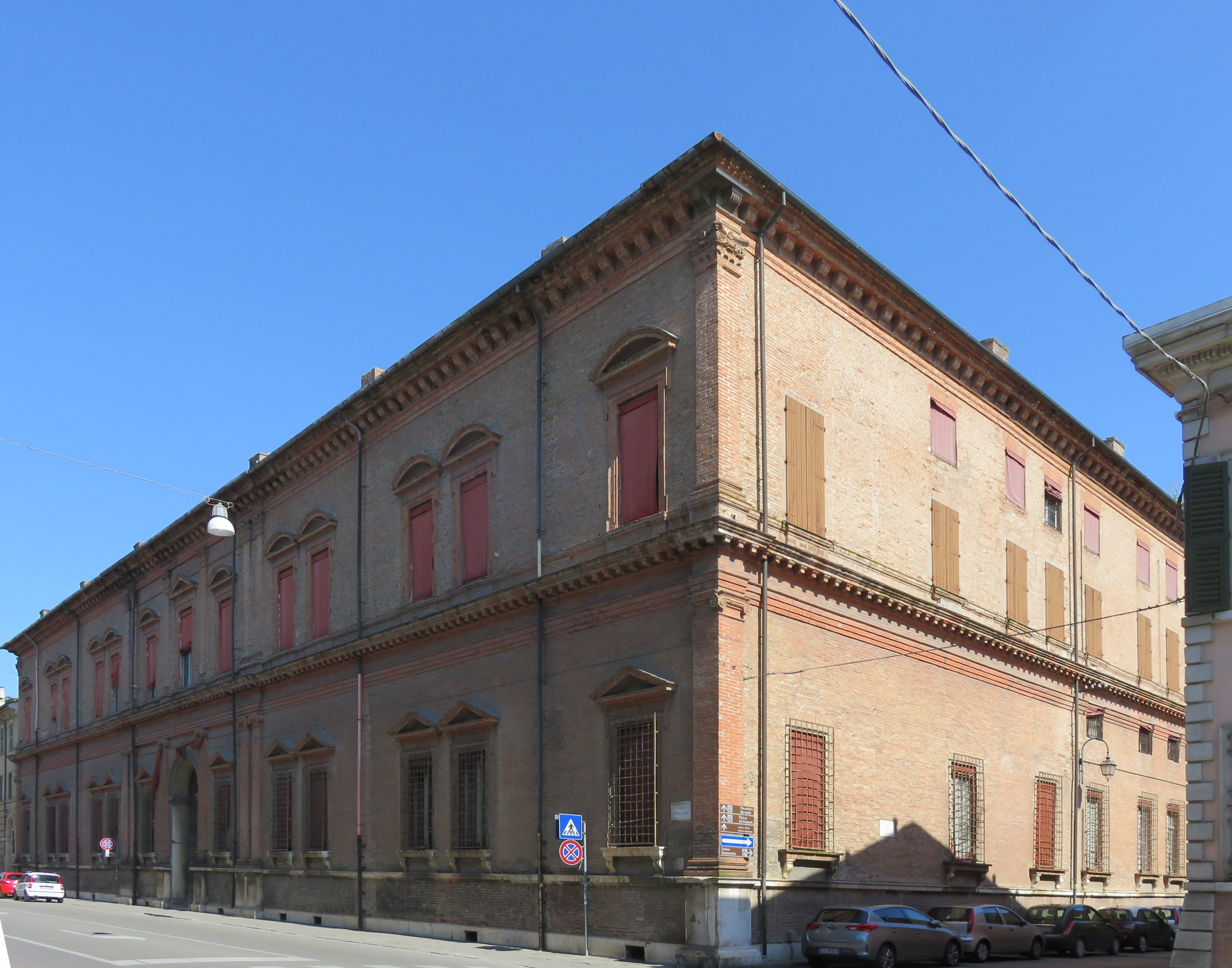 Palazzo Massari, Ferrara